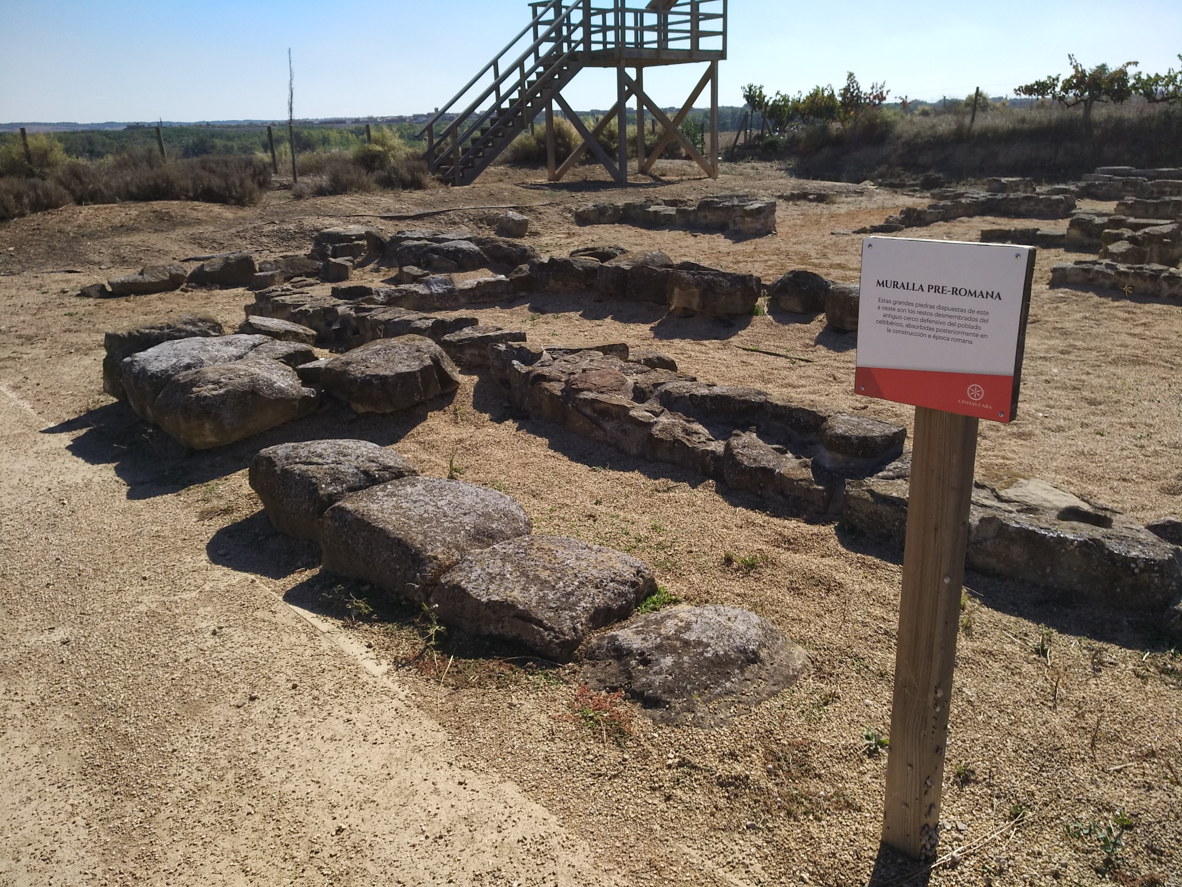 Muralla prerromana